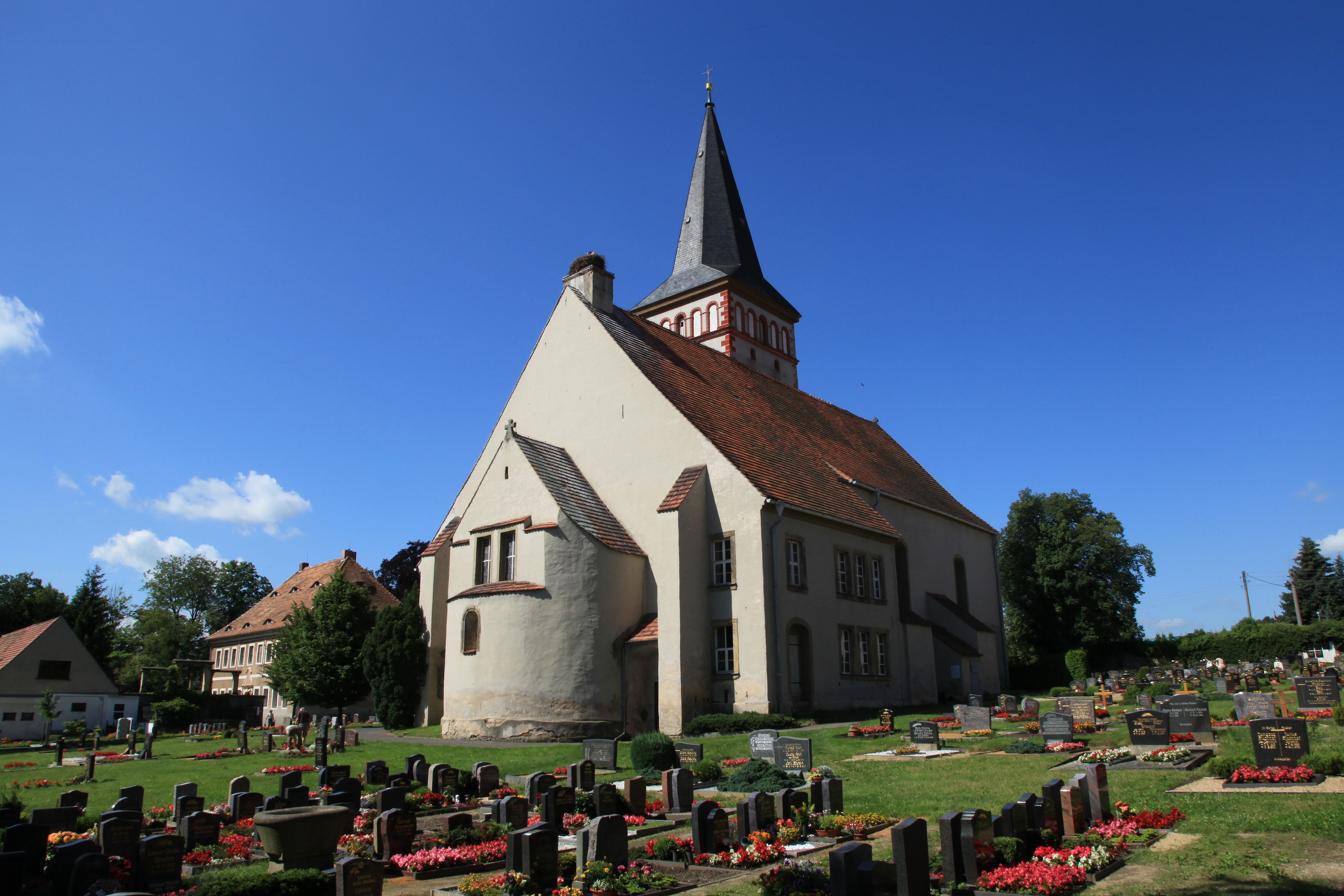 Kirche und Friedhof, Torgaer Straße in Kodersdorf